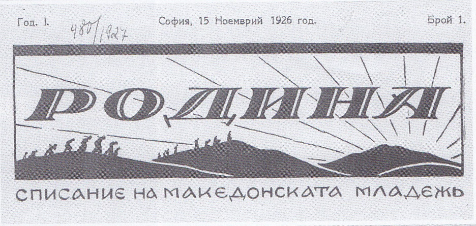 front page